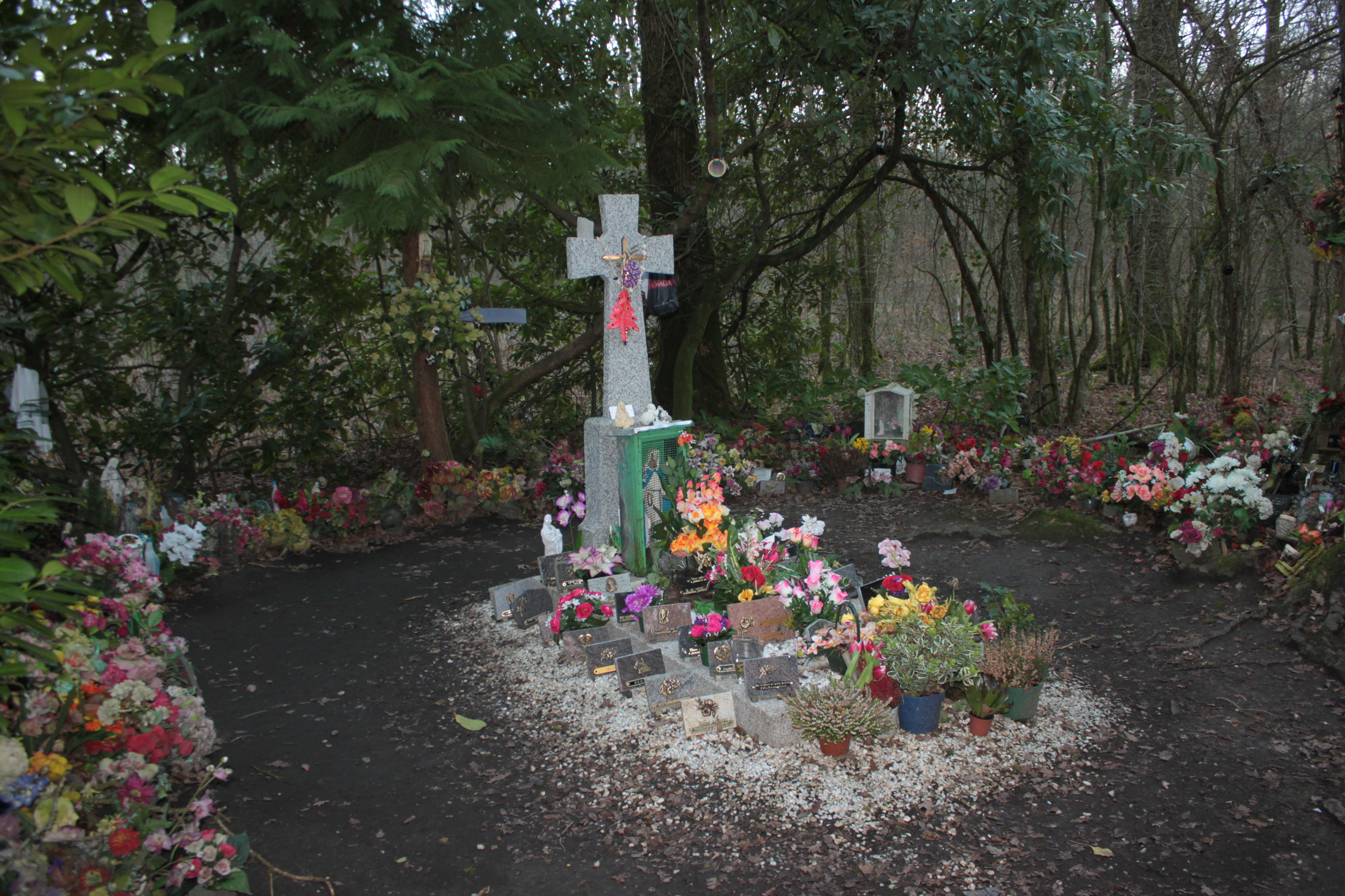 Tombe à la Fille, forêt de Teillay, Fr-35-Teillay.